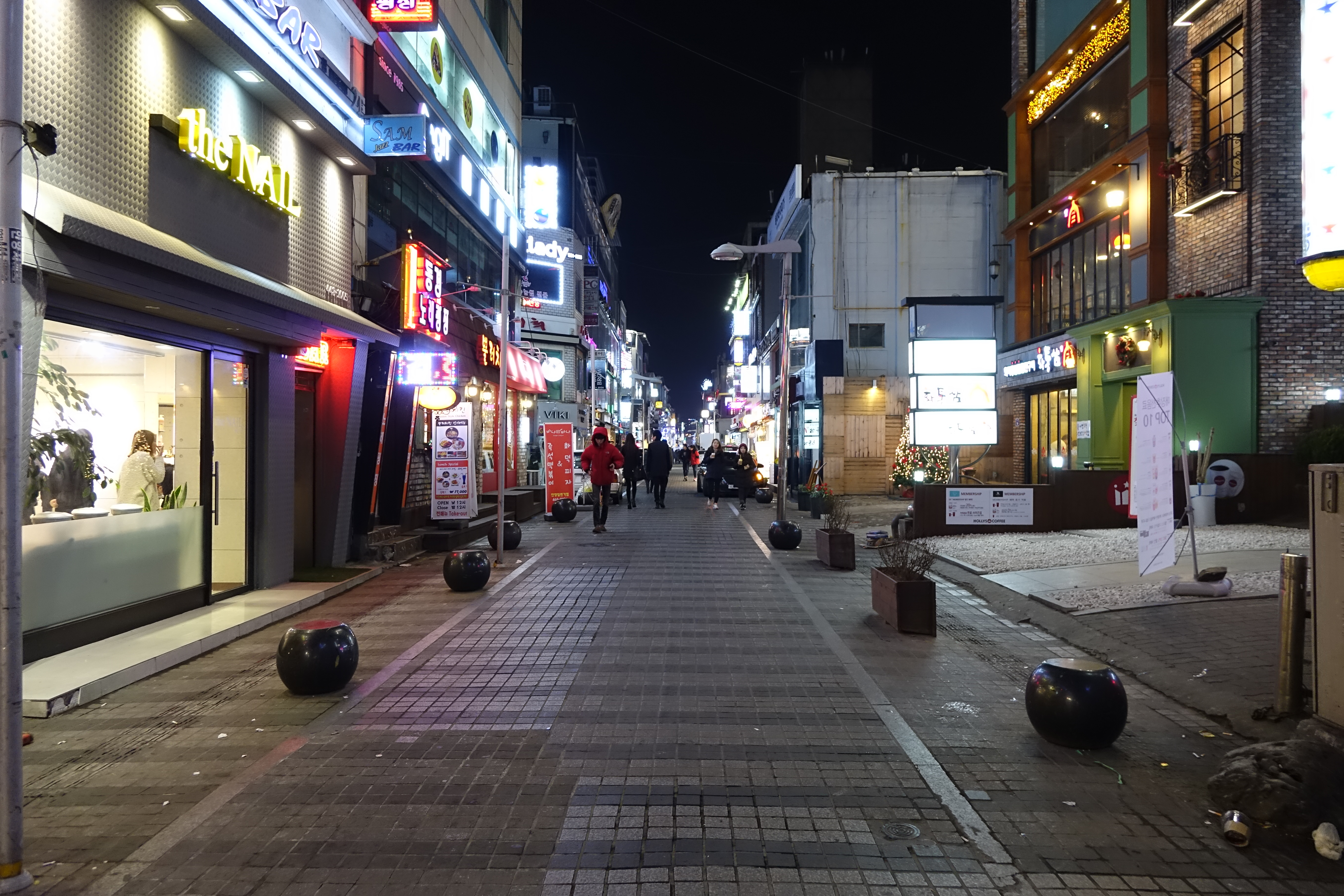 안양1번가